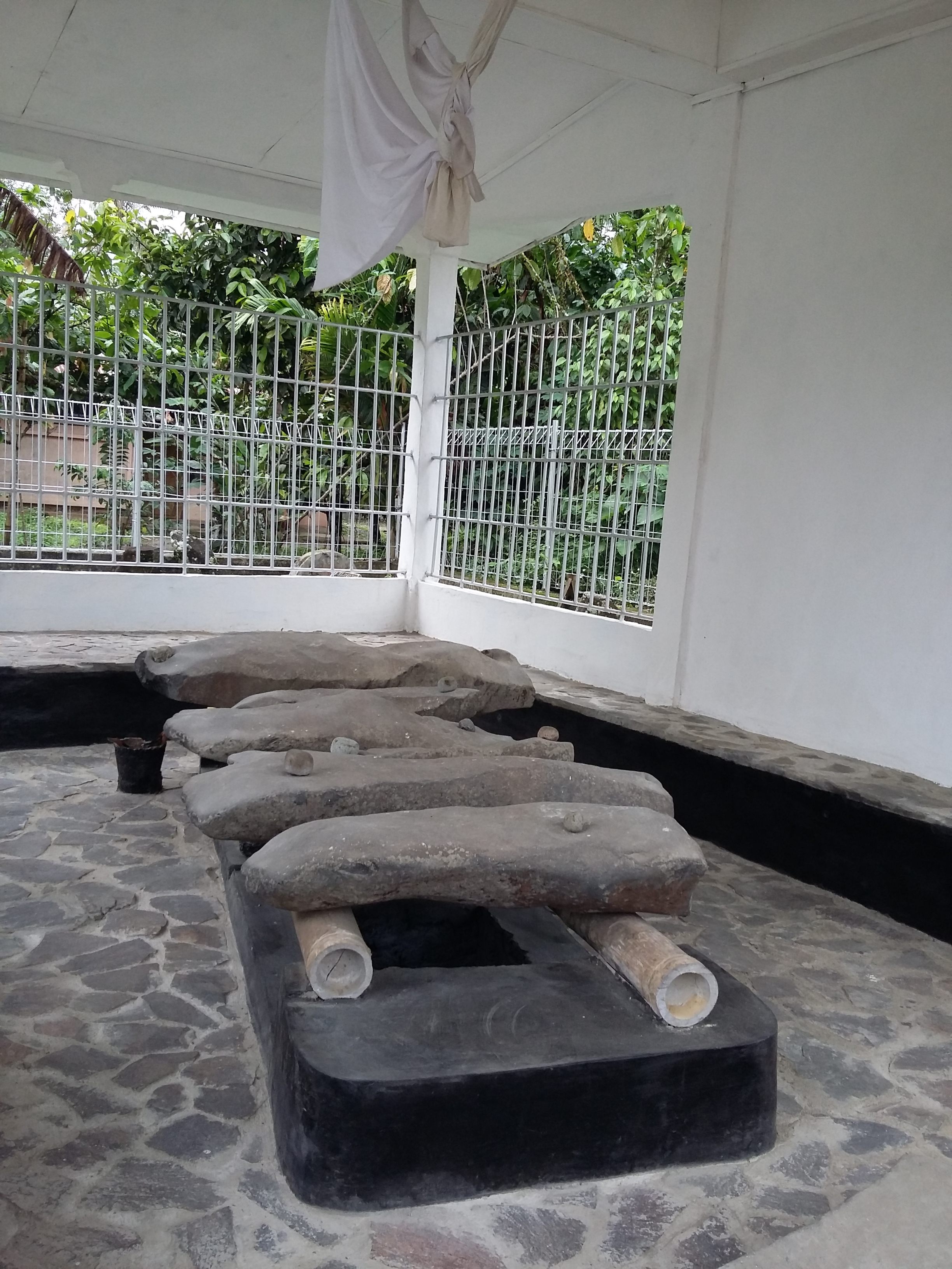 Batu Talempong, atau sering juga disebut Talempong Batu, merupakan batu yang dapat menghasilkan bunyi-bunyian seperti bunyi Talempong (alat musik trasional Minangkabau) bila dipukul. Batu Talempong ini berada di Nagari Talang Anau, Kecamatan Gunuang Omeh, Kab. Lima Puluh Kota, Sumatra Barat.